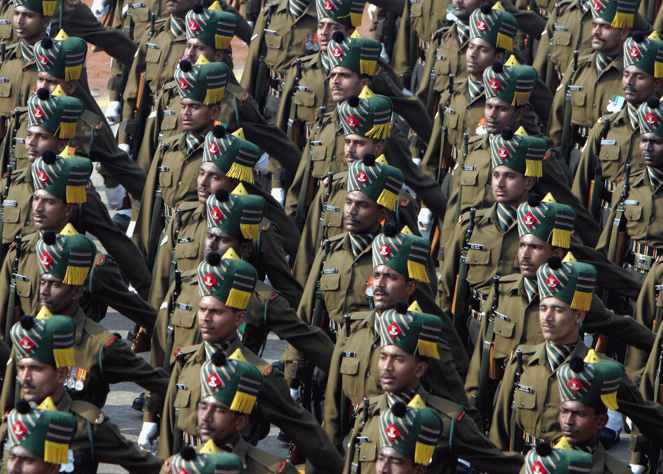 Nova Délhi (Índia) - Desfile do Dia da República, na Rajpath.